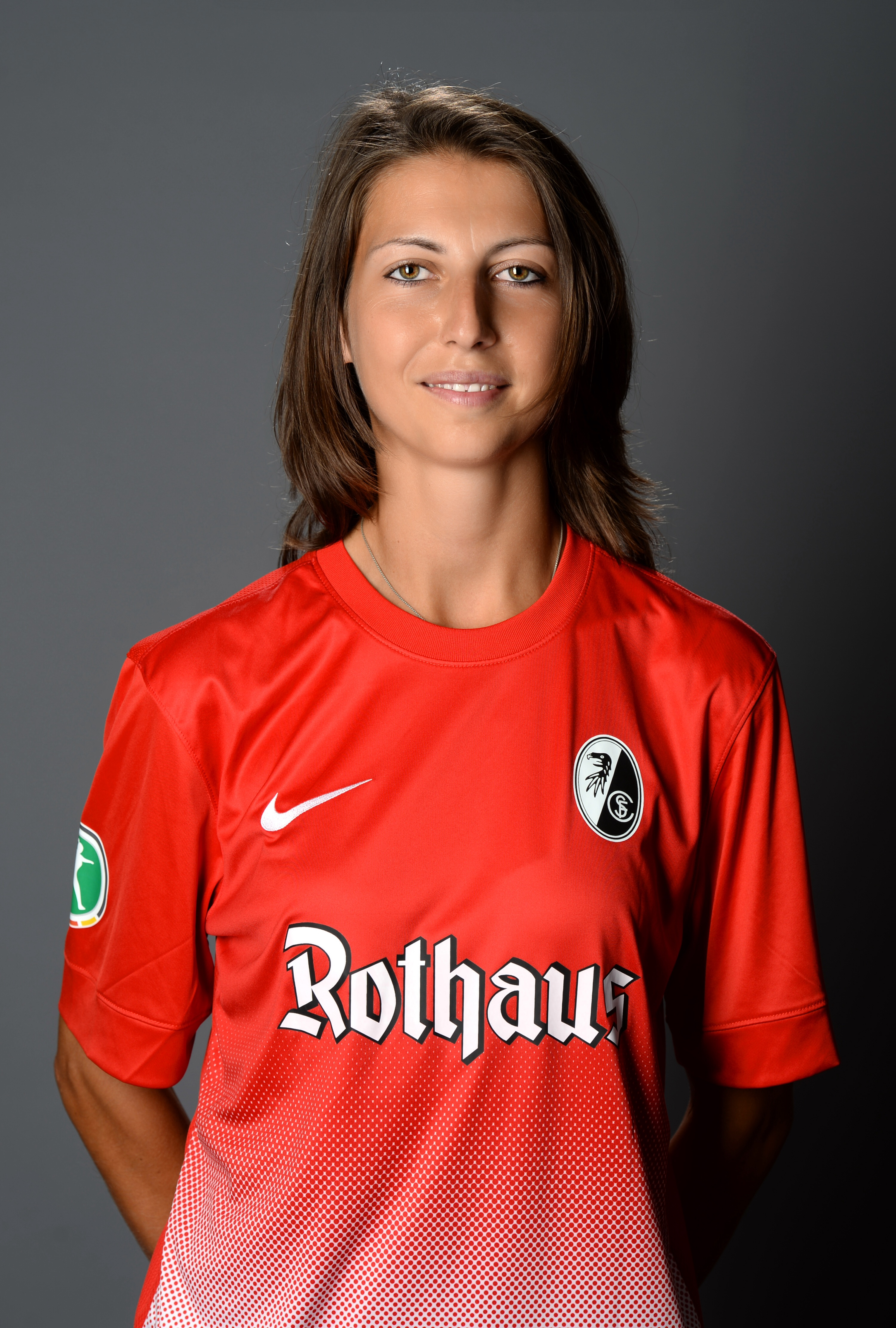 Spielerbild Carmen Höfflin aus der Saison 2013/2014